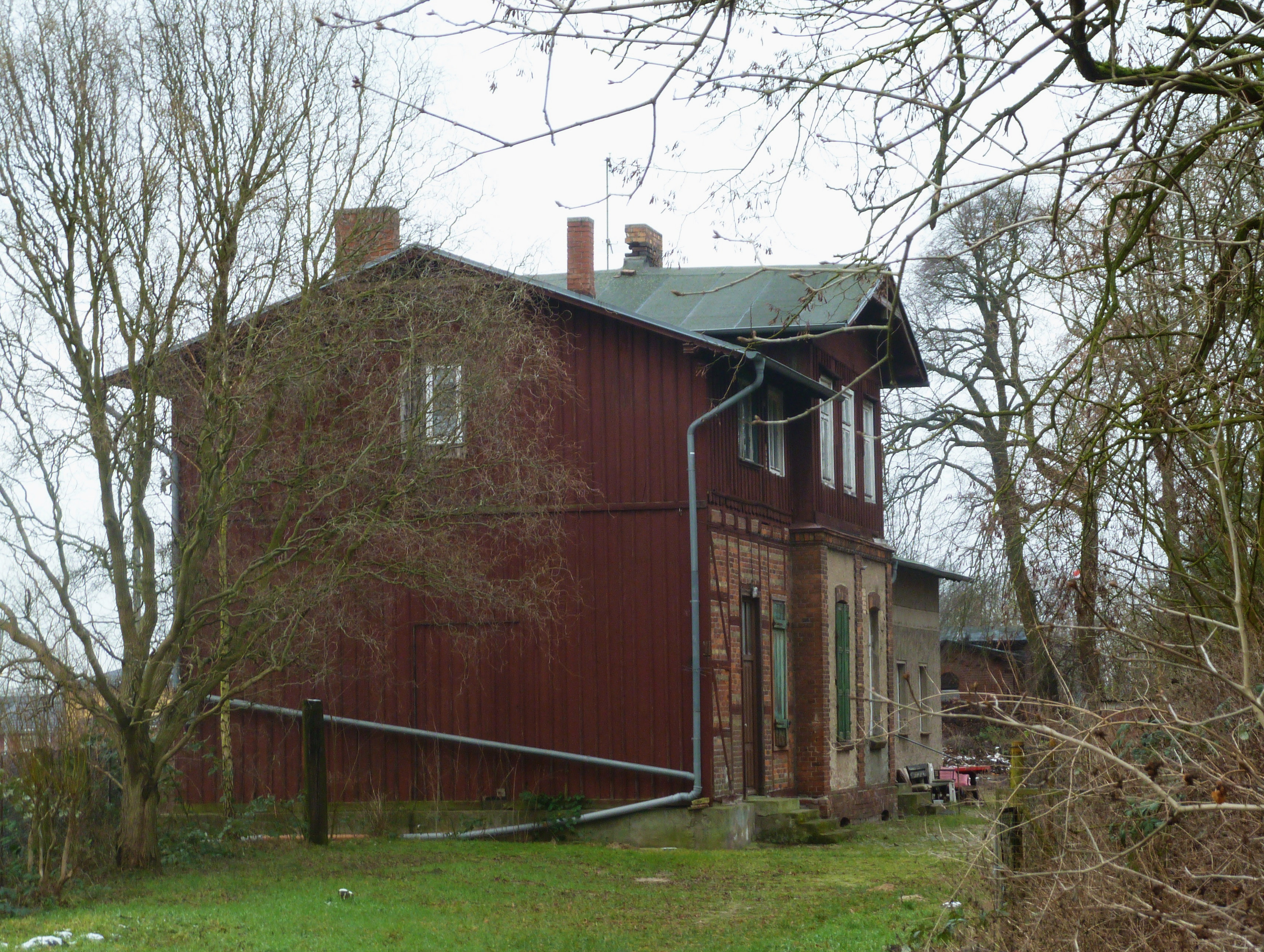 Neuruppin, Alter Paulinenauer Bahnhof von 1880, Baudenkmale, frühere Straßenseite